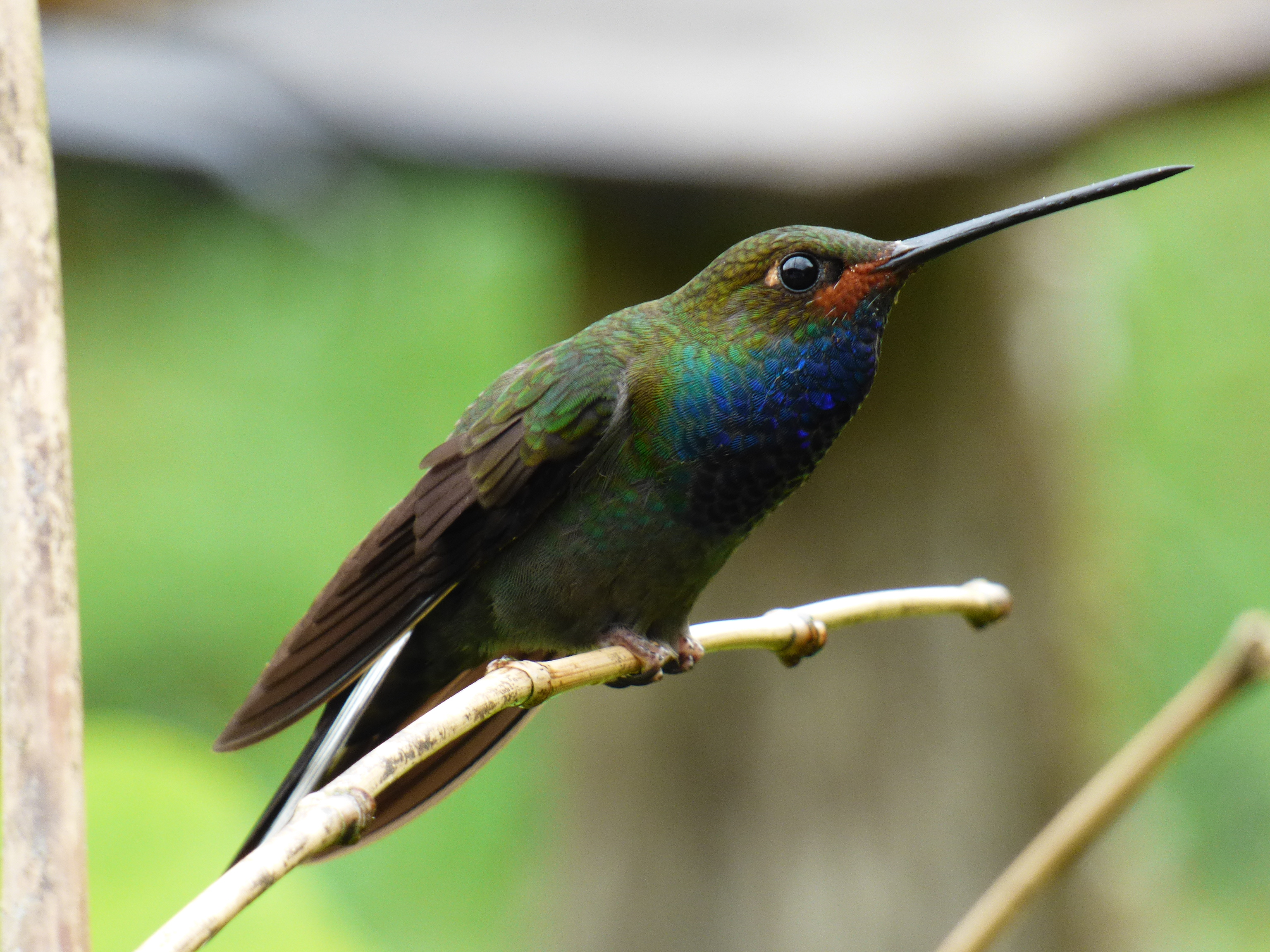 Urochroa bougueri (Colibrí nagüiblanco)